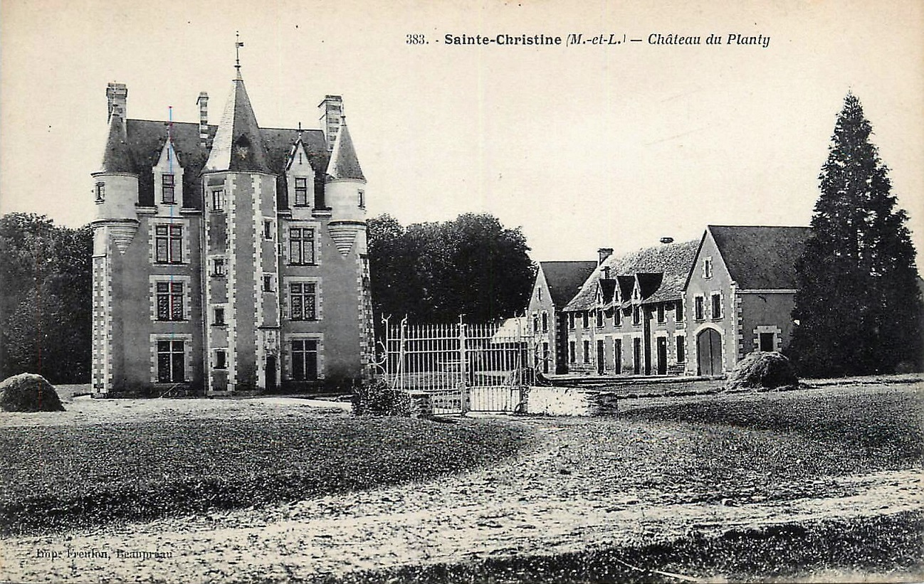 Carte postale - 383. Sainte-Christine (M.-et-L.). Château du Planty